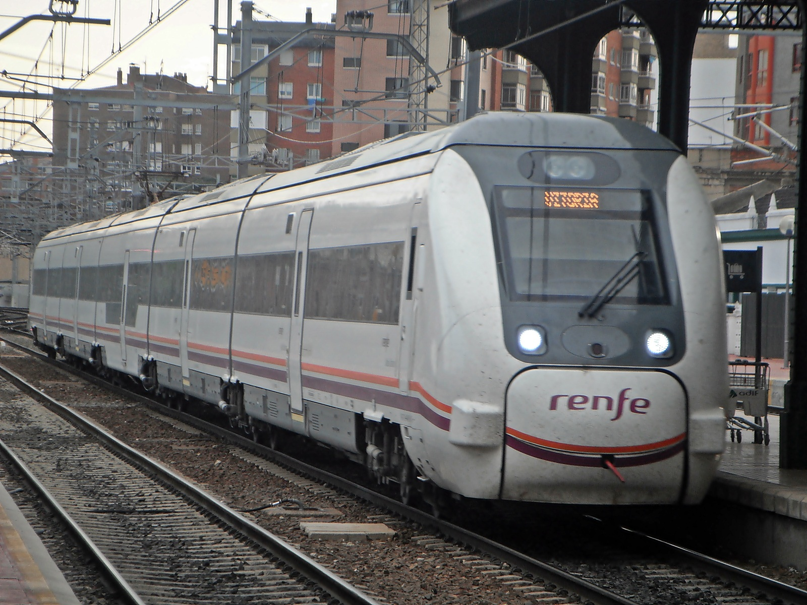 Tren automotor de la serie 449 en Valladolid en la ruta Madrid-Vitoria